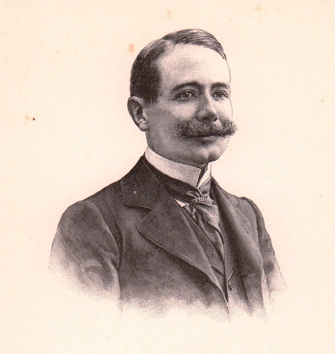 French writer Abel Hermant (1862-1950)